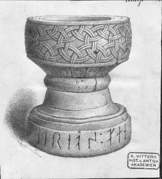 Dopfunt av sandsten, signerad Andreas, 1100-1249. Teckning av Gustaf Brusewitz. Kategori: (04) DopfuntarDopfunt av sandsten, signerad Andreas, 1100-1249. Teckning av Gustaf Brusewitz.